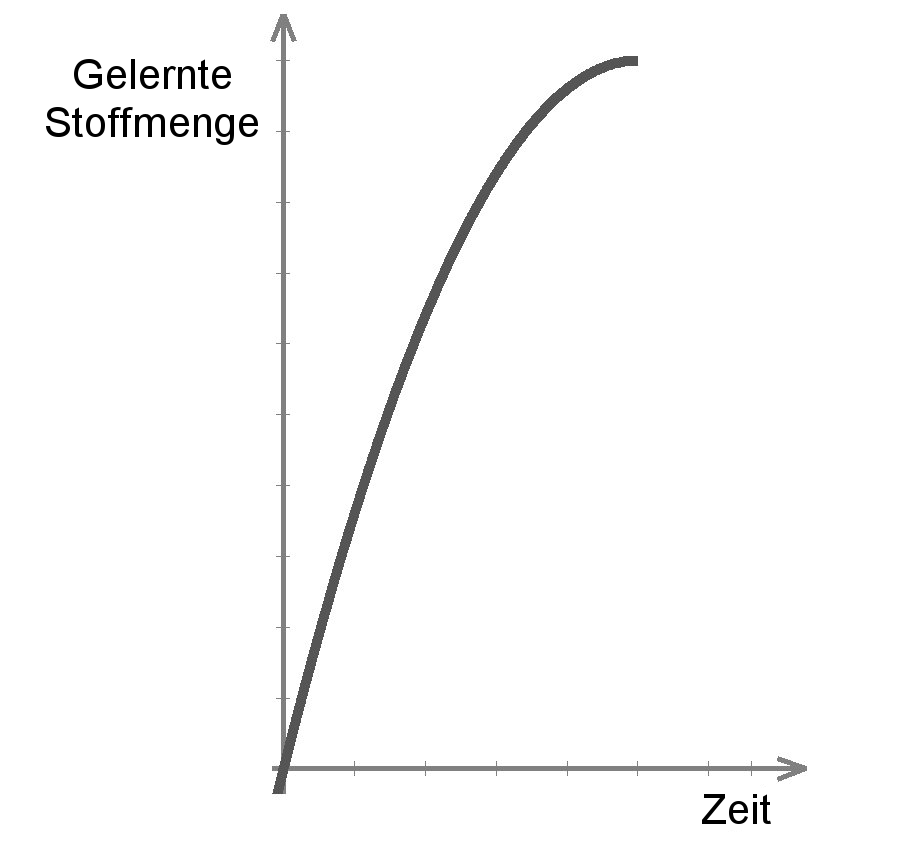 steile Lernkurve in ihrer ursprünglichen Bedeutung; in wenig Zeit wird viel Stoff gelehrt, so dass dieser Stoff relativ bequem gelernt werden kann